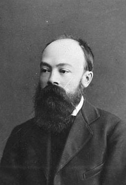 Dmitrij Klemenc (1848-1914)